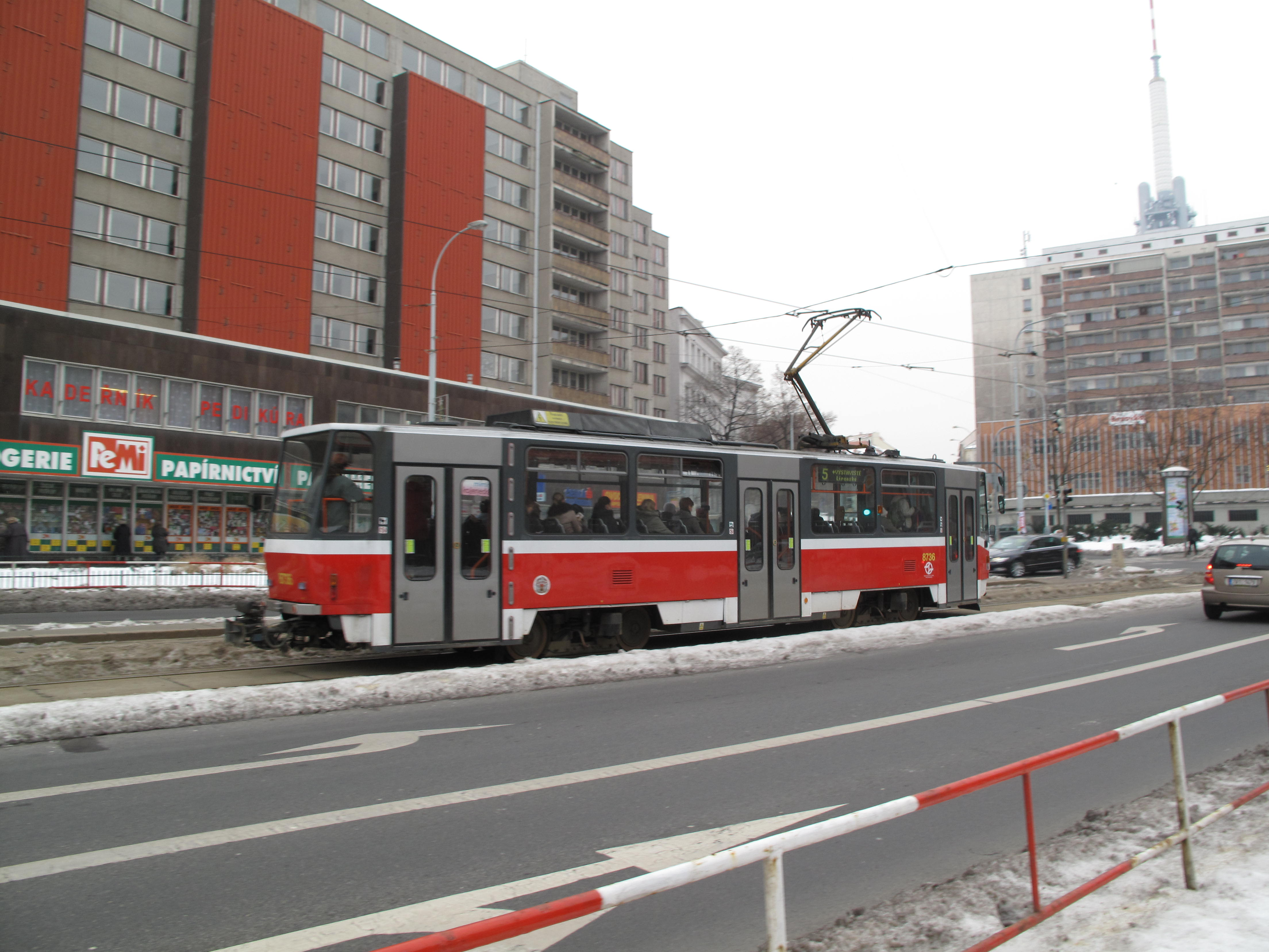 Olšanské náměstí